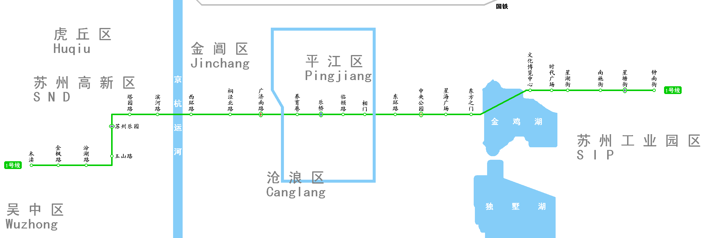 苏州轨道交通1号线路线图